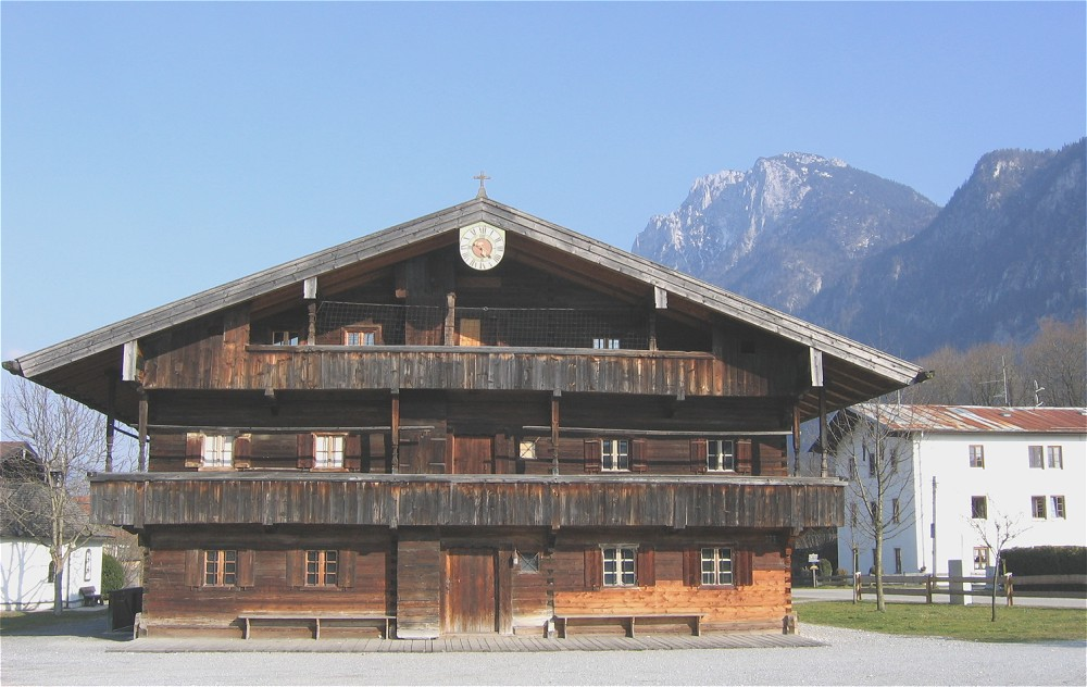 Blaahaus in Kiefersfelden, Heimatmuseum, im Hintergrund der Zahme Kaiser